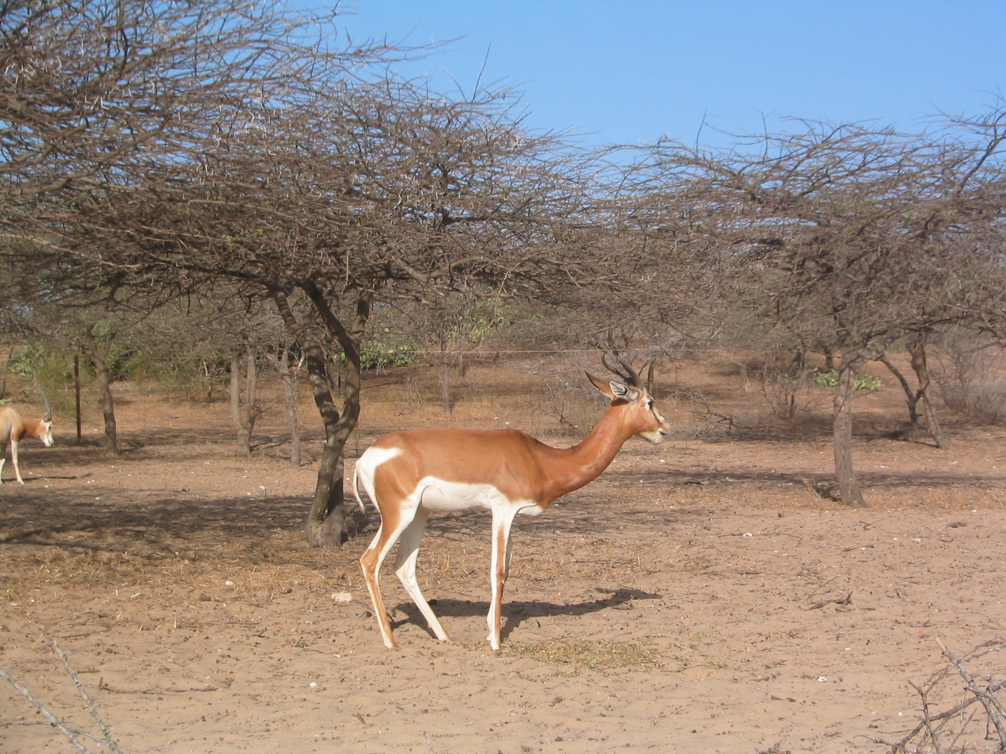 Gazella dama à la réserve de Guembeul (Sénégal)